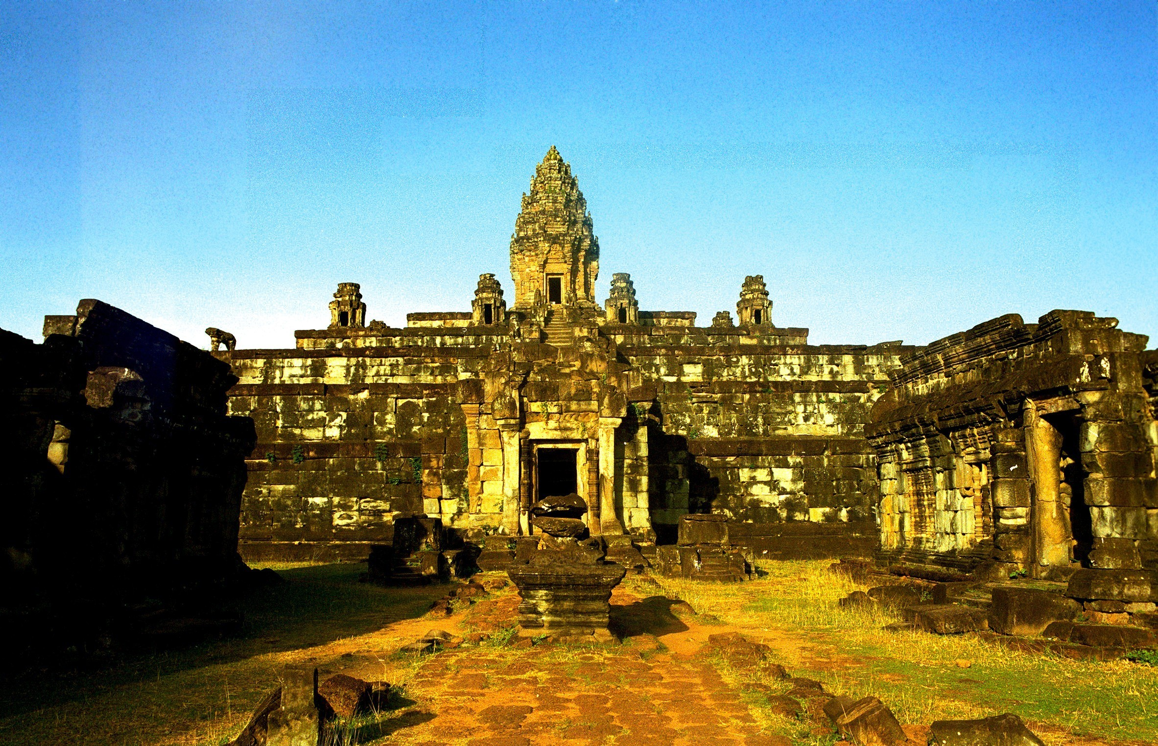 Bakong temple, Angkor, Cambodia